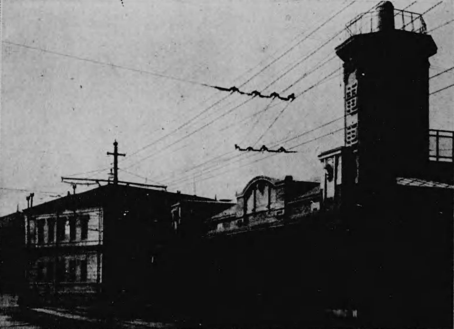 日本の国立国会デジタルコレクションで公開されている『沿線名勝案内』（発行：兵庫電気軌道会社）の8コマに掲載されている「兵庫停留所」